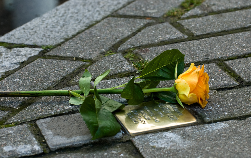 Führung über die Stolpersteine in der Innenstadt Hamburgs. Stolperstein für Wilhelm Vogt in der ABC-Straße 51 in der Neustadt.